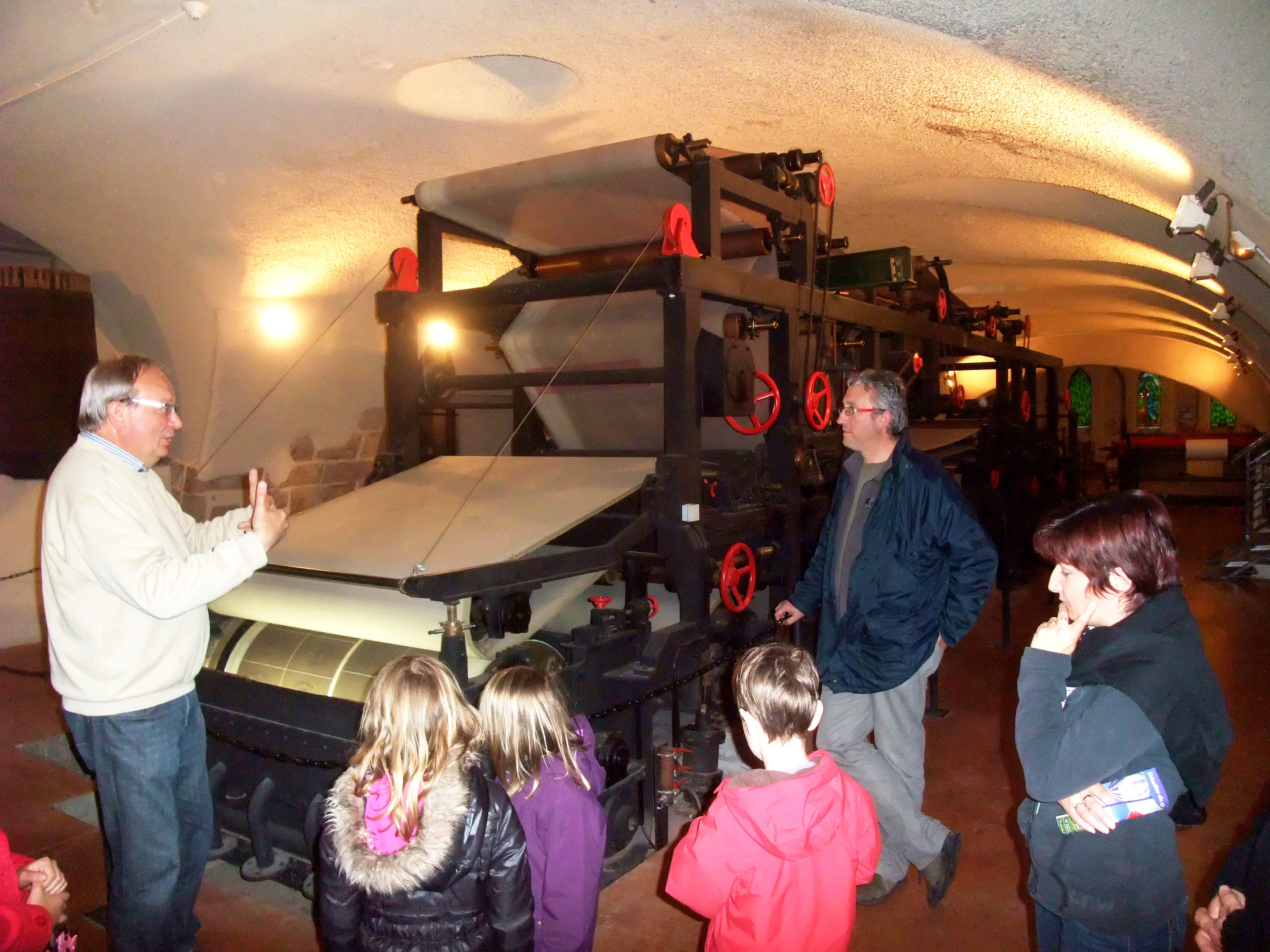 Davézieux Musée intérieur